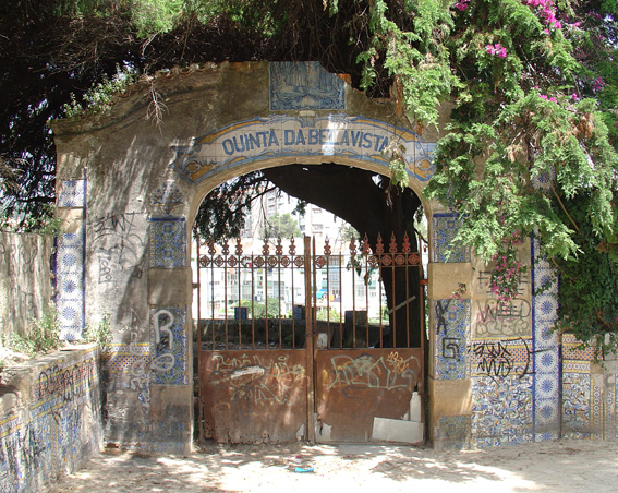 Cacém - Quinta da Bela Vista - Casa de Joaquim Ribeiro de Carvalho - Porta para a Quinta - Fotografia de António Neves (31 de Julho de 2007)